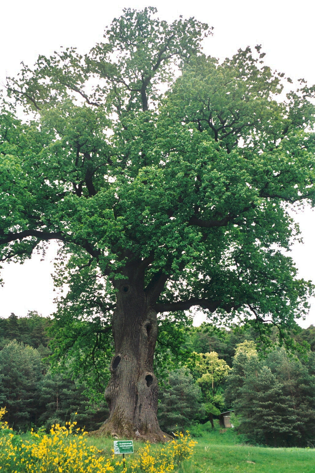 Kaiseroak at Füttersee